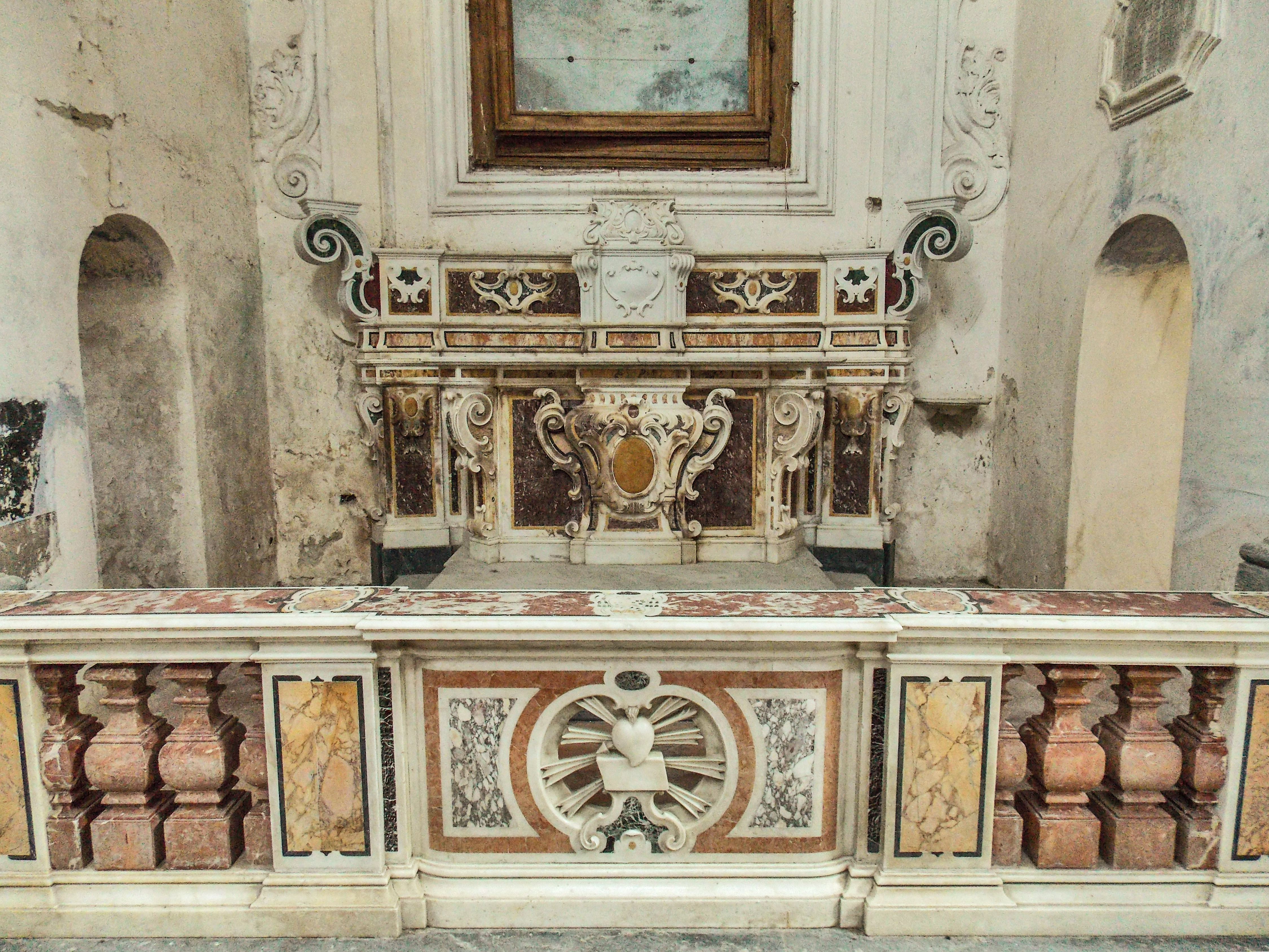 Altare De Vita nella chiesa sconsacrata di Santa Teresa a Benevento